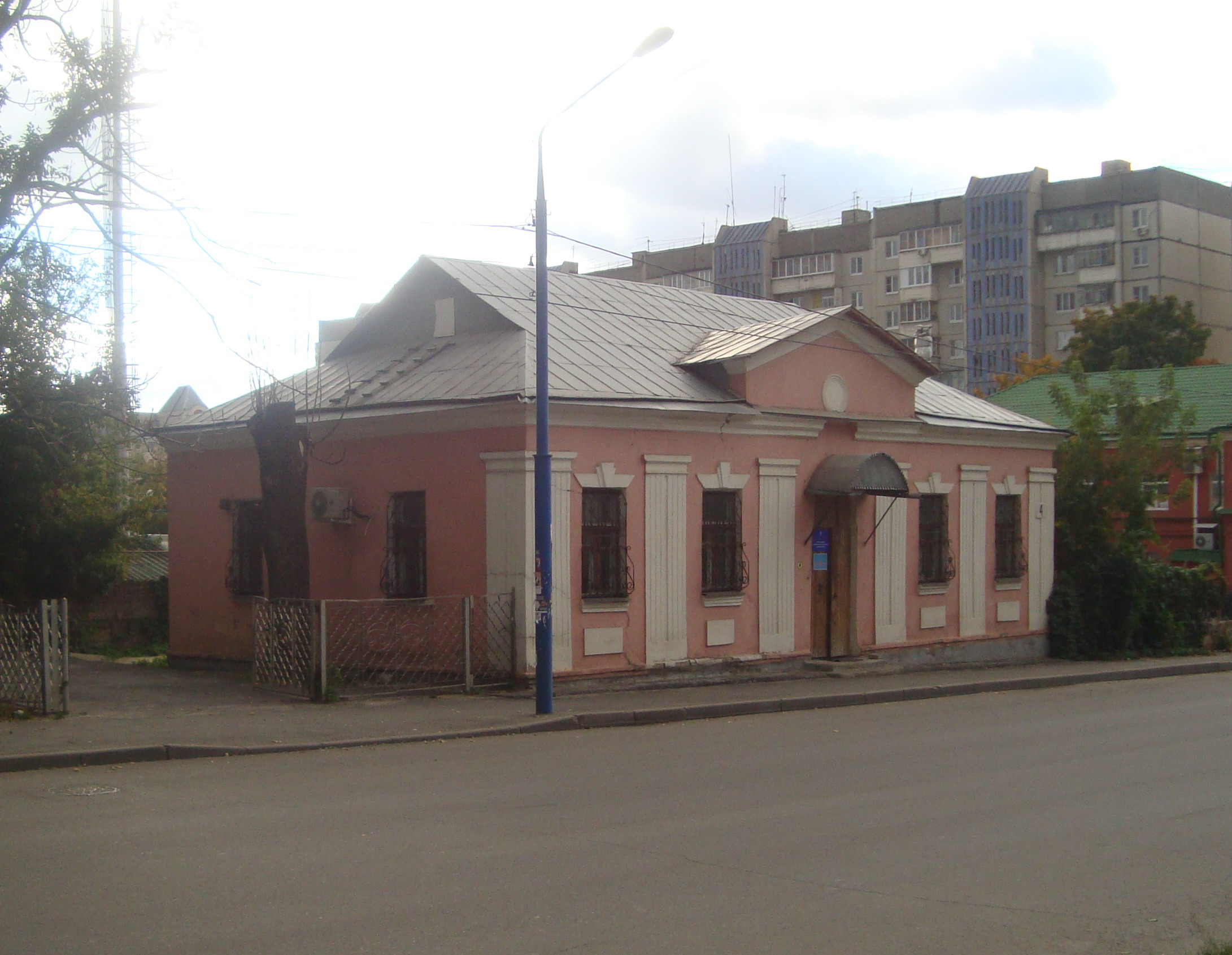 Липецк. Улица Горького, 4